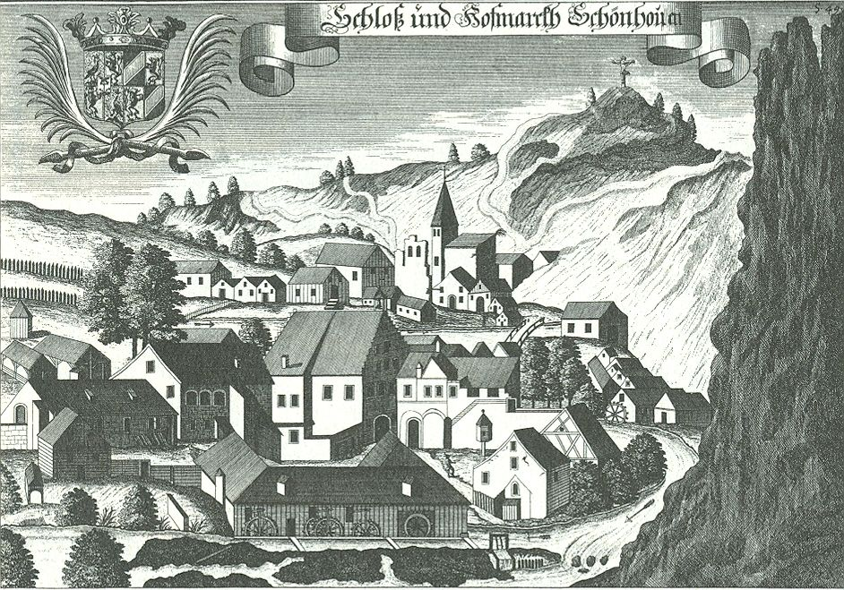 Schloss und Hormark Schönhofen